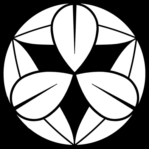 「九枚笹」紋（染抜）